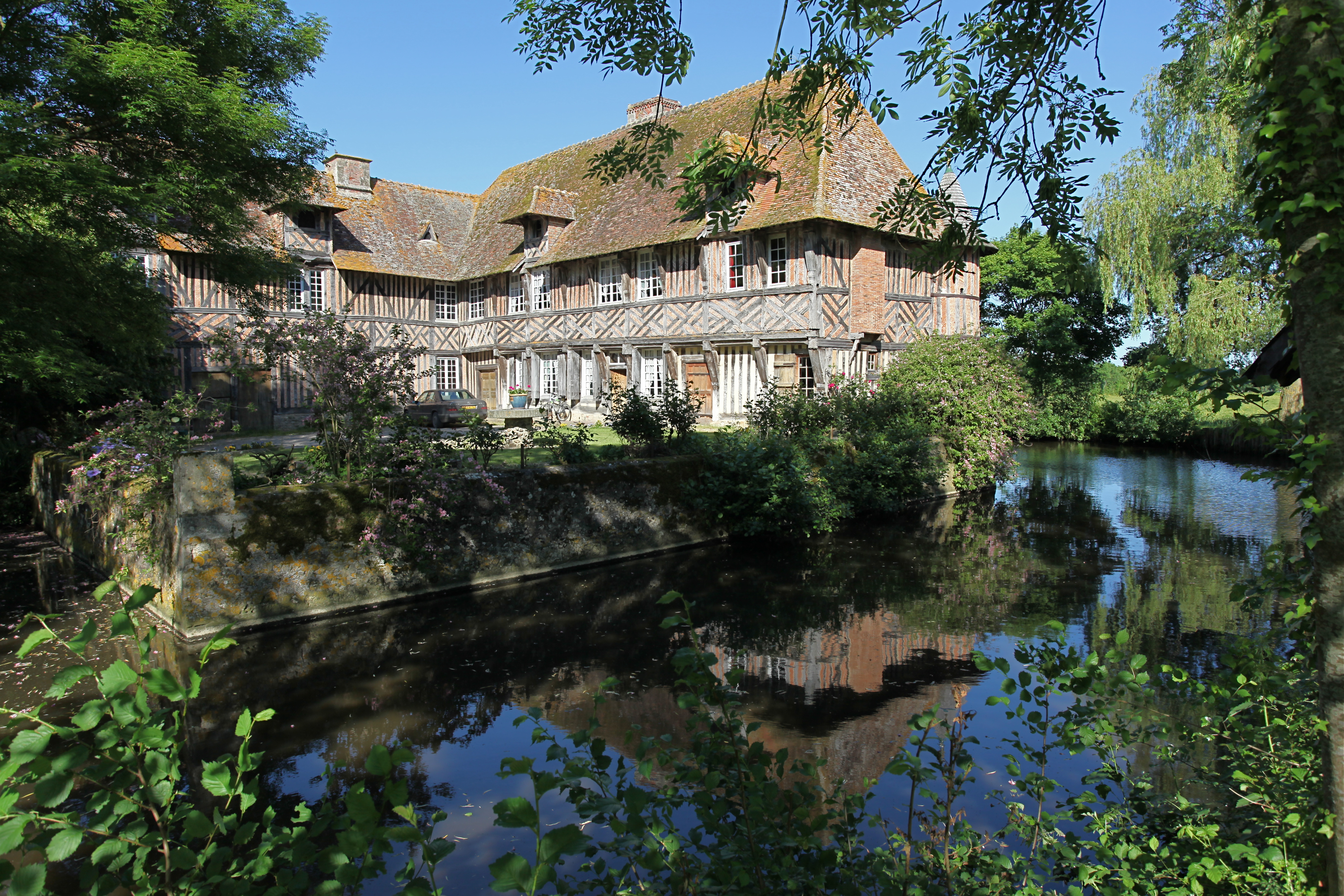 Manoir de Coupesarte, Calvados, France